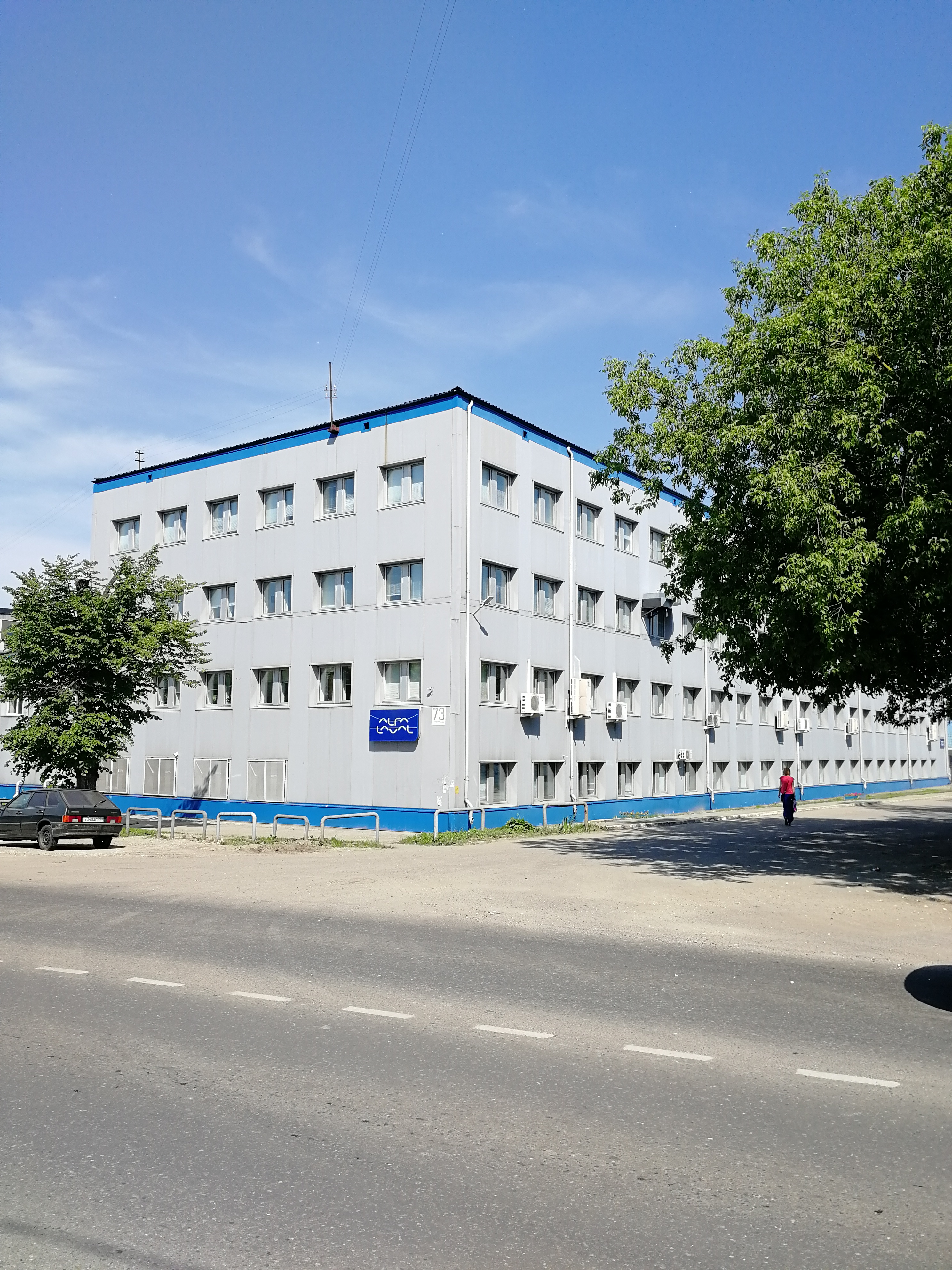 Город Королёв, Станционная улица, дом 73, Alfa Laval